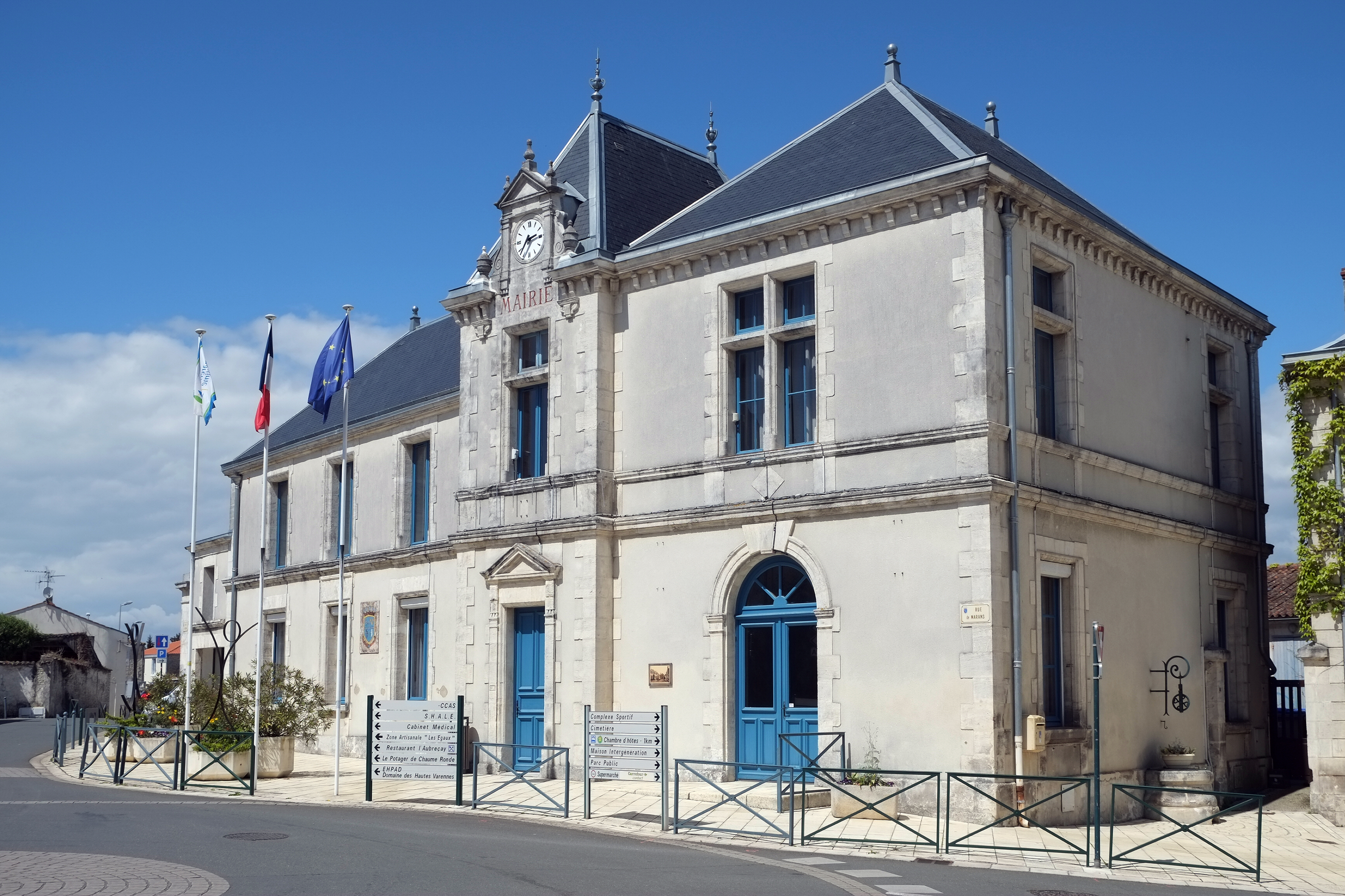 Mairie Saint-Xandre Charente-Maritime France